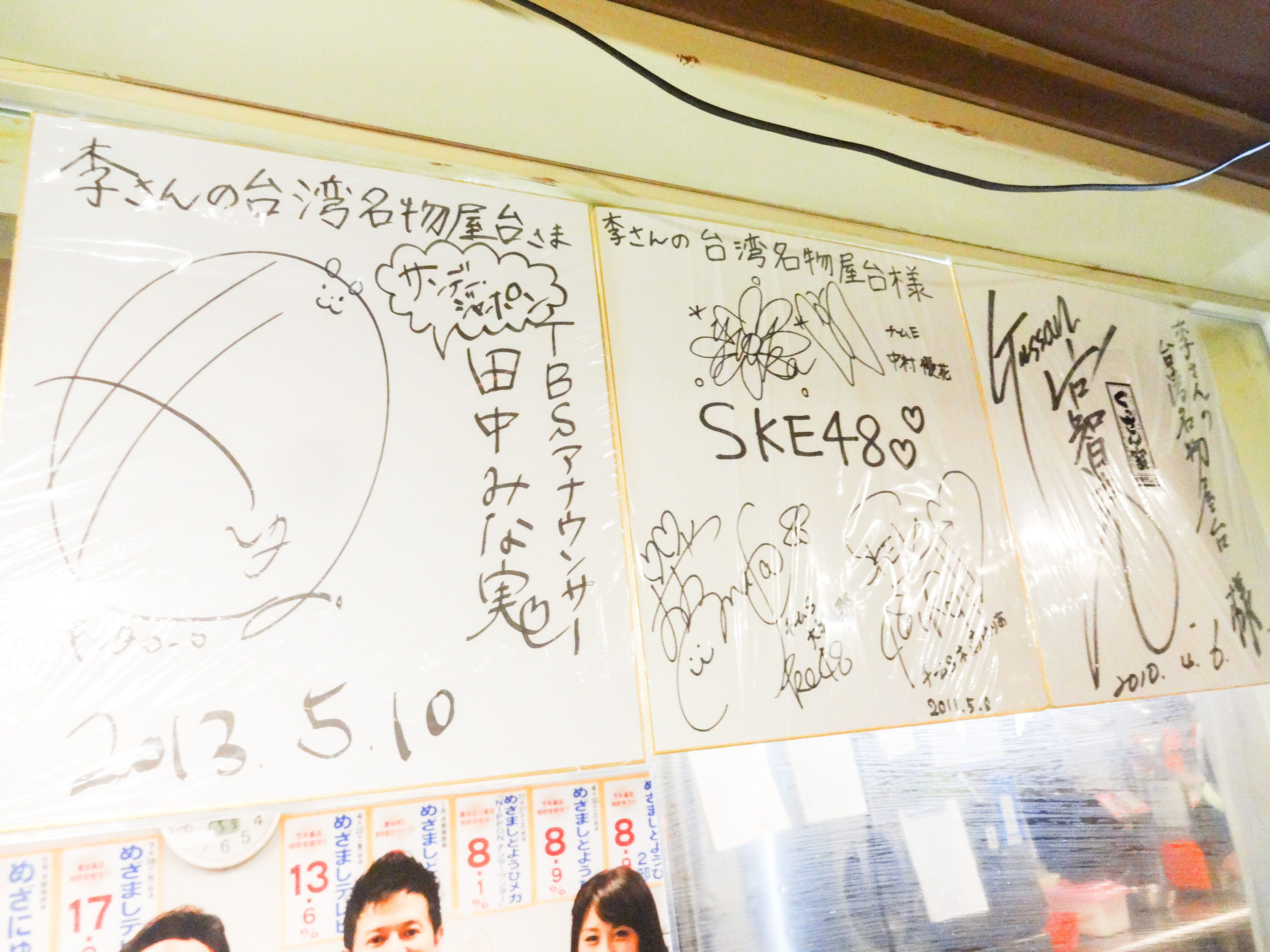 東京ミートレア サンデージャポン 田中みな実